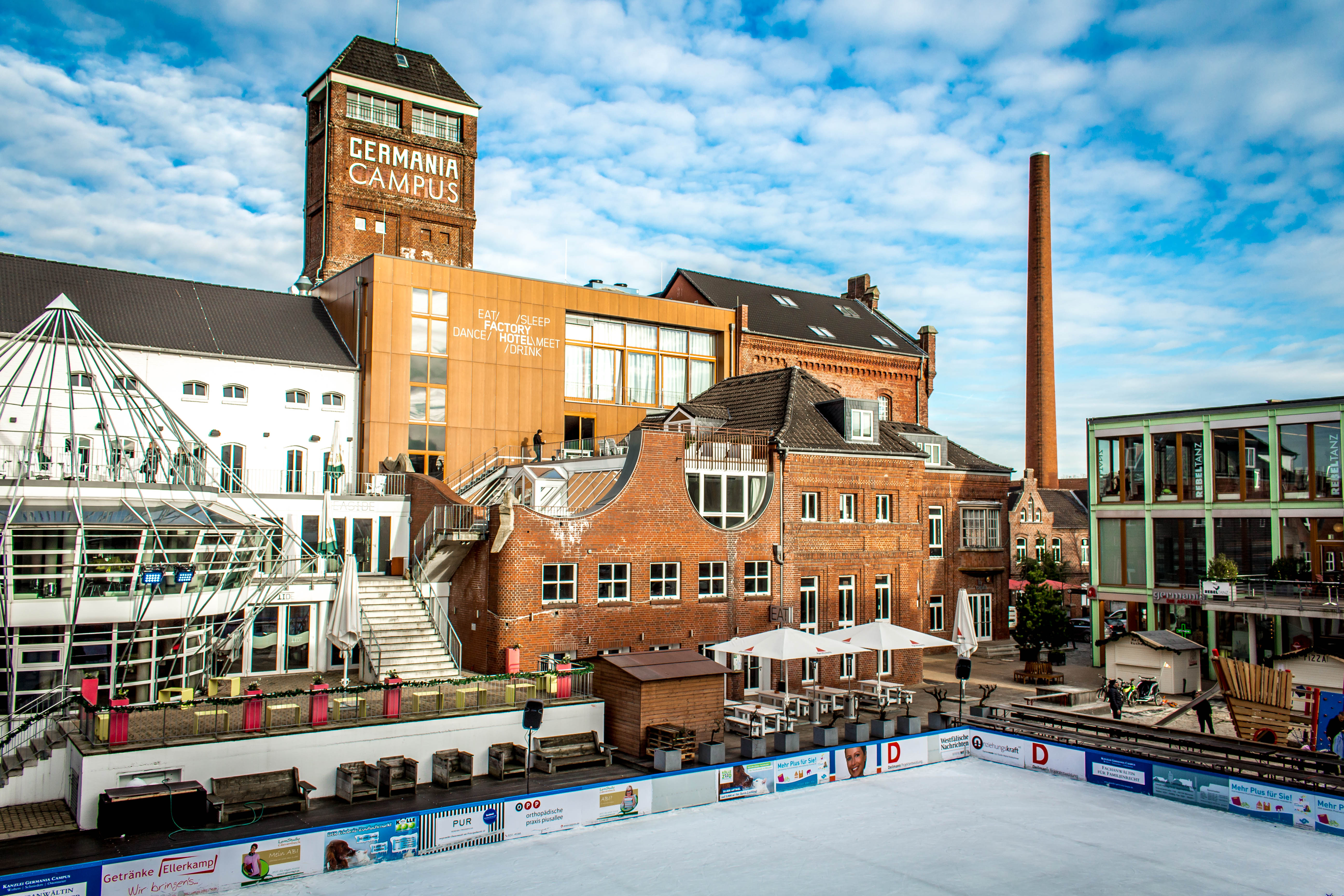 Der Germania Campus im Norden Münsters